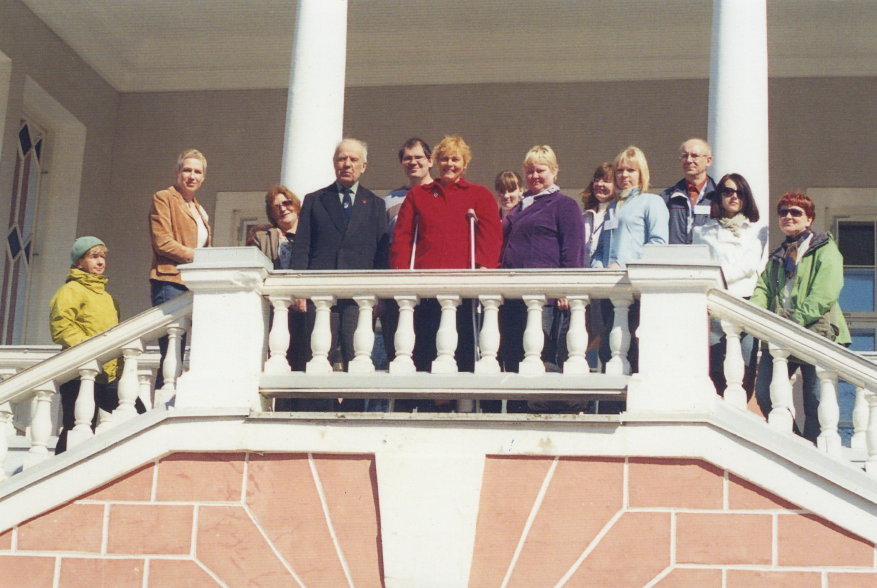 Giidi -ja kodulookonkursi "Sagadi Mõisarääkijad" osalisd Sagadis.